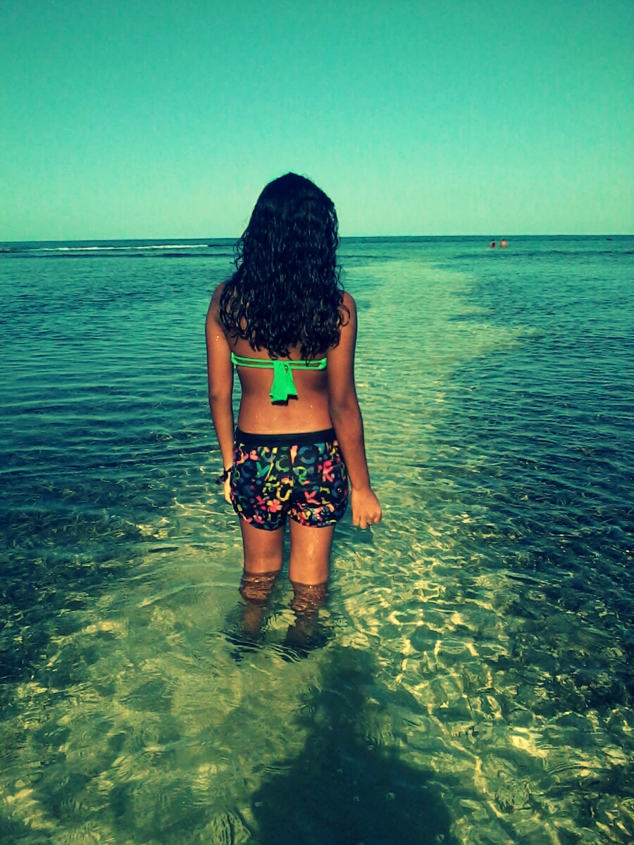 Chichiriviche